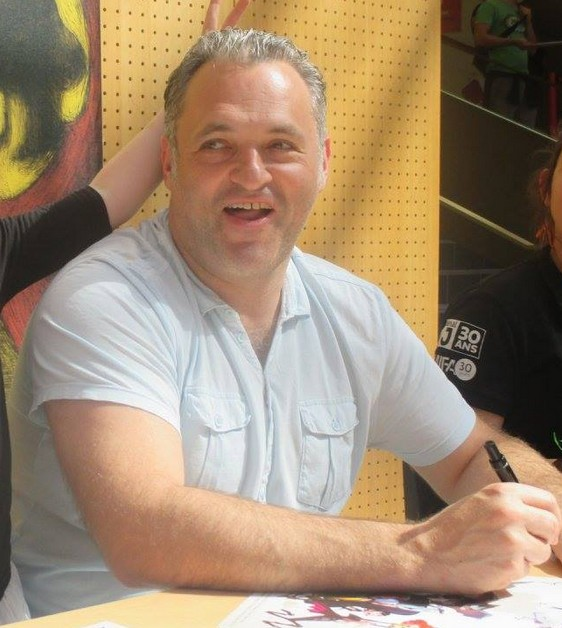 Genndy Tartakovsky au festival international du film d'animation d'Annecy